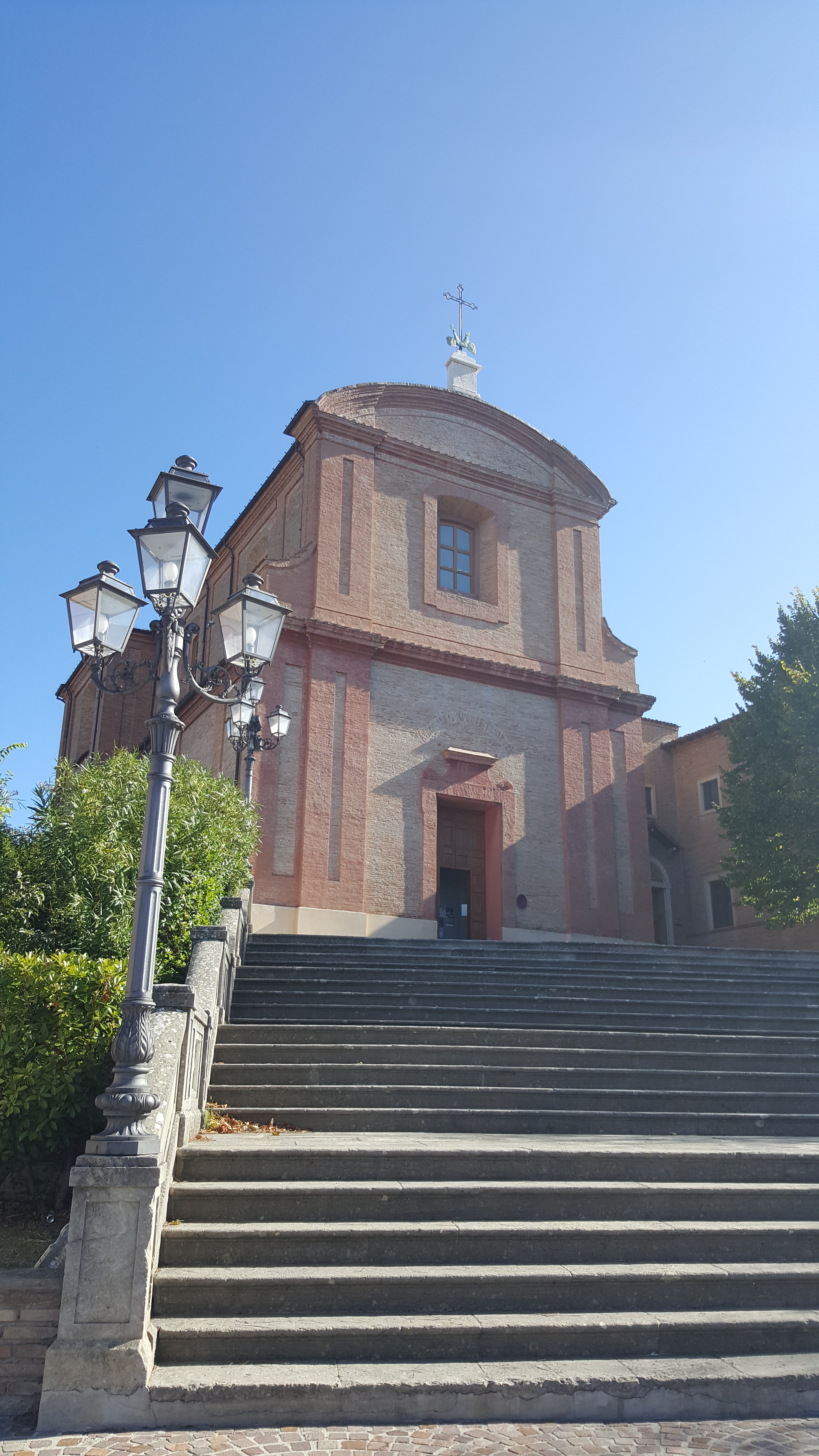 Santuario del Santissimo Crocifisso This is a photo of a monument which is part of cultural heritage of Italy.